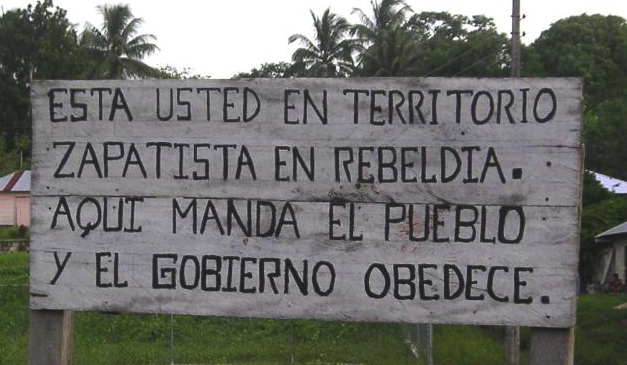 Zapatistische Willkommensgruß auf einem Schild vor einem Dorf in Chiapas Mexico